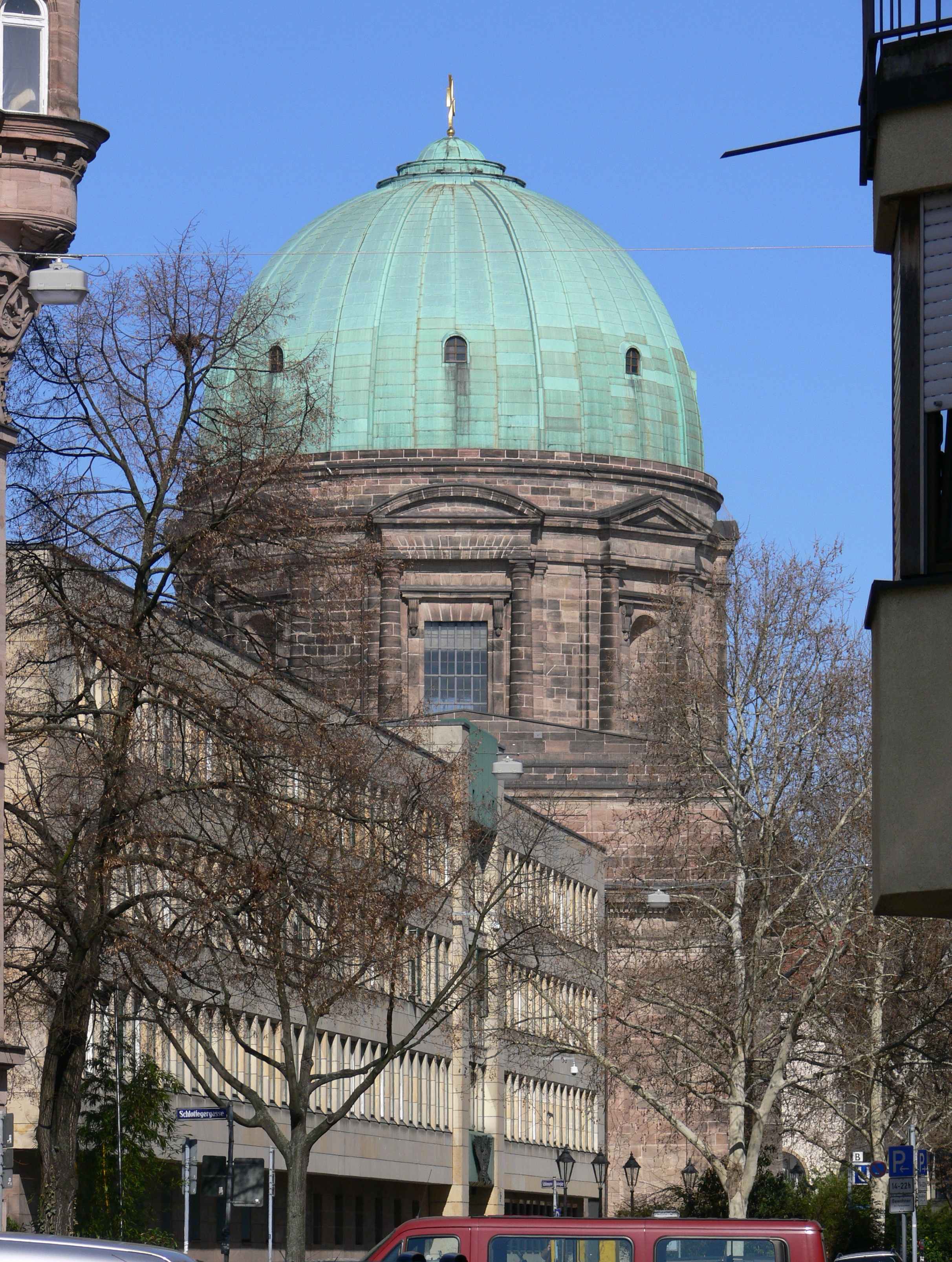 Nürnberg, Kath. Kirche St. Elisabeth und Polizeipräsidium Mittelfranken